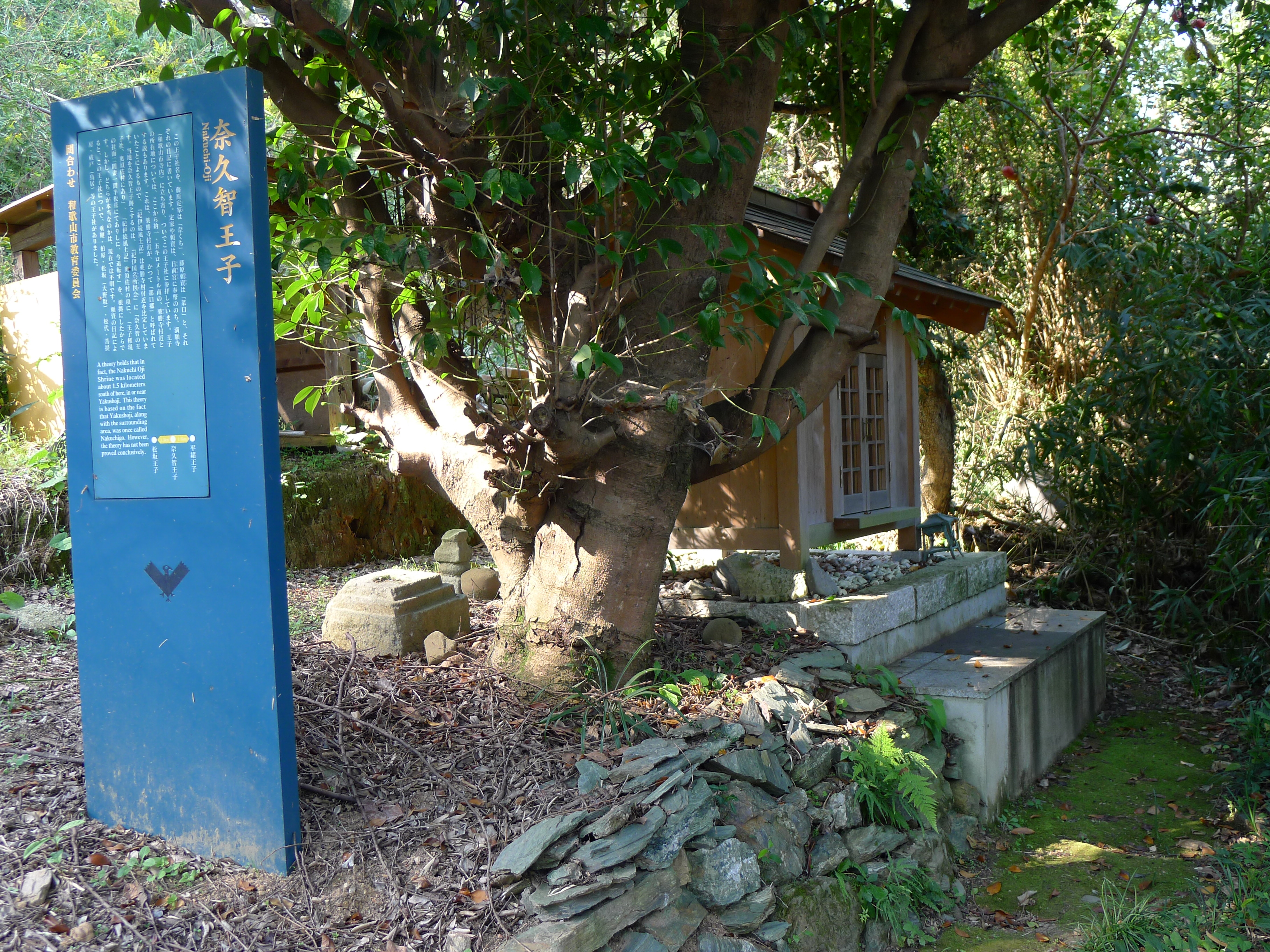 熊野古道・紀伊路の九十九王子の一つ奈久智王子（和歌山県海南市）